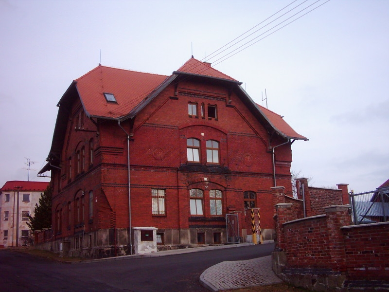 Aš, budova Ašských služeb s.r.o., Krajkářská 1275/11